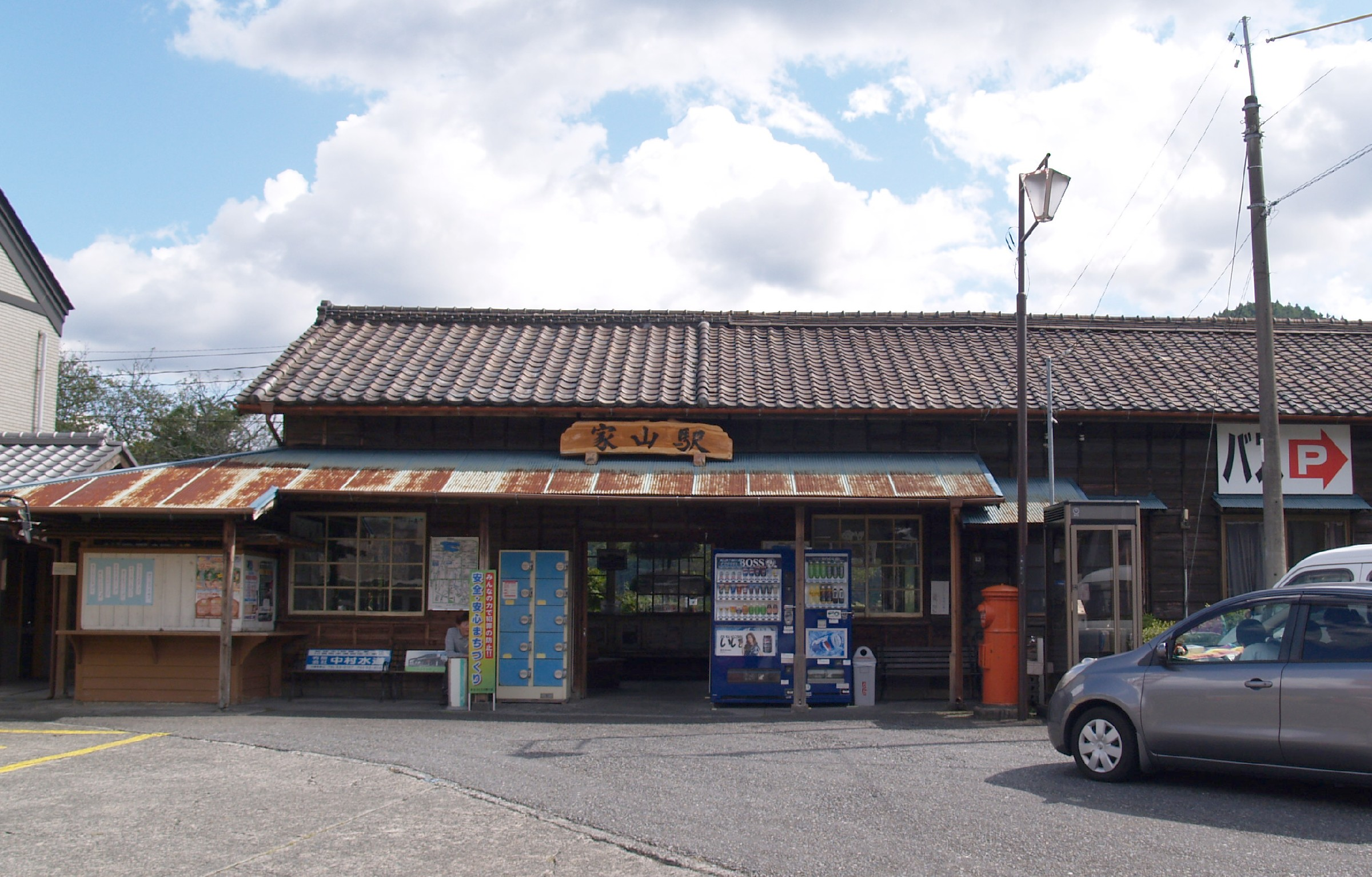 家山駅